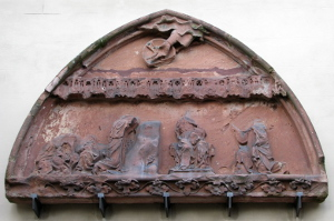 Ehemaliger Tympanon der St.-Gallus-Kirche in Ladenburg. Oben: die Hand Gottes. Unten: Christus am Ölberg, thronende Muttergottes, knieender Bischof